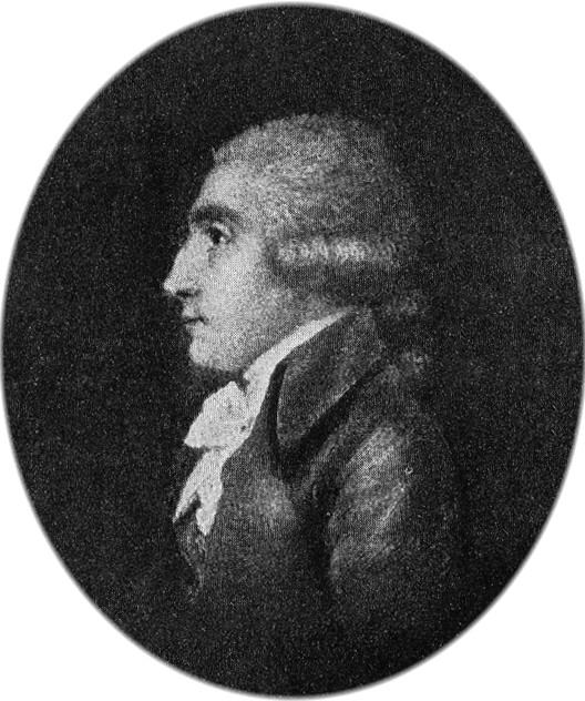 Jean Baptiste François Pierre Bulliard (c1742-1793)